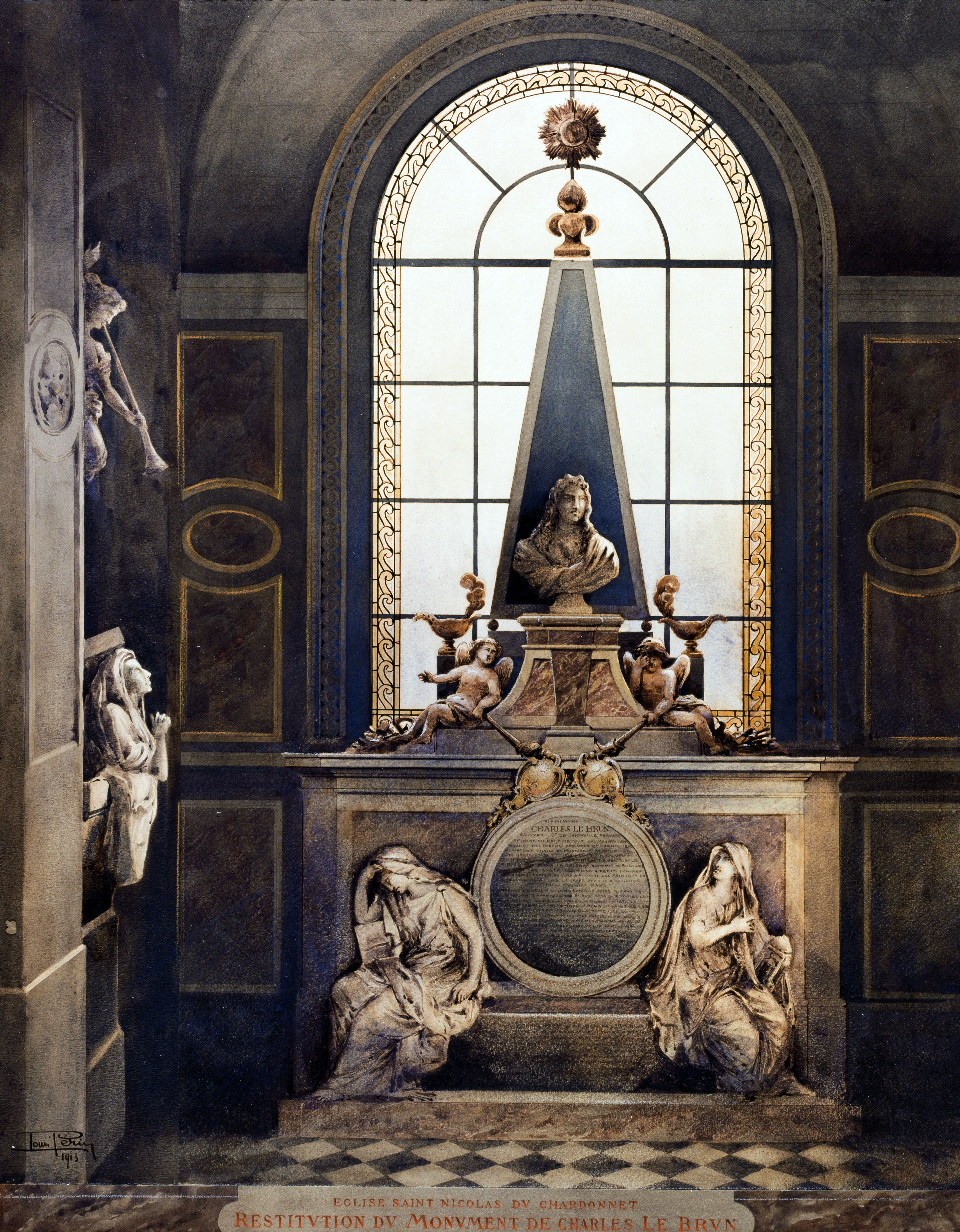 Dessin d'architecture, propriété du Musée Carnavalet, Paris